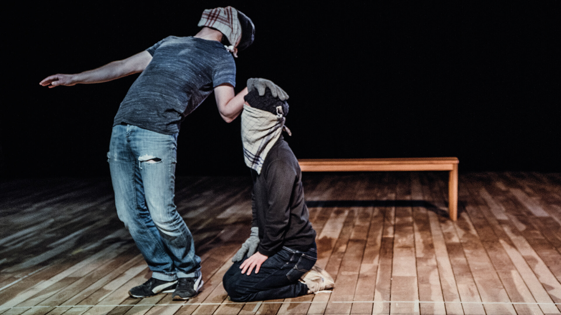 Foto uit een voorstelling